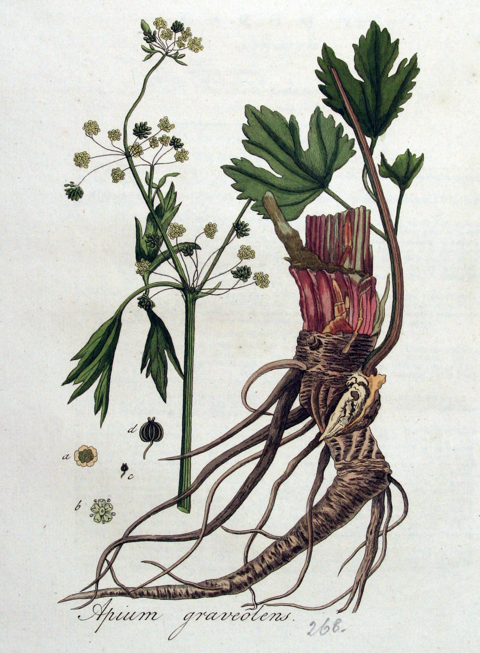 Apium graveolens L.